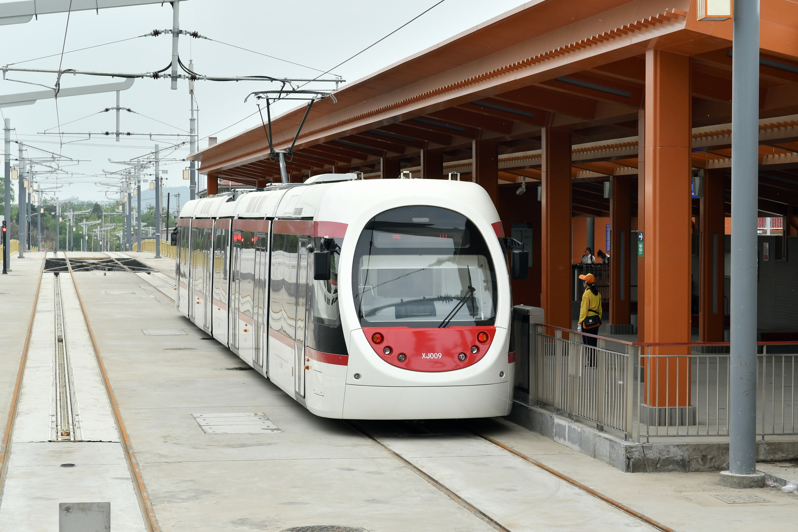 北京西郊线有轨电车，拍摄于香山站。